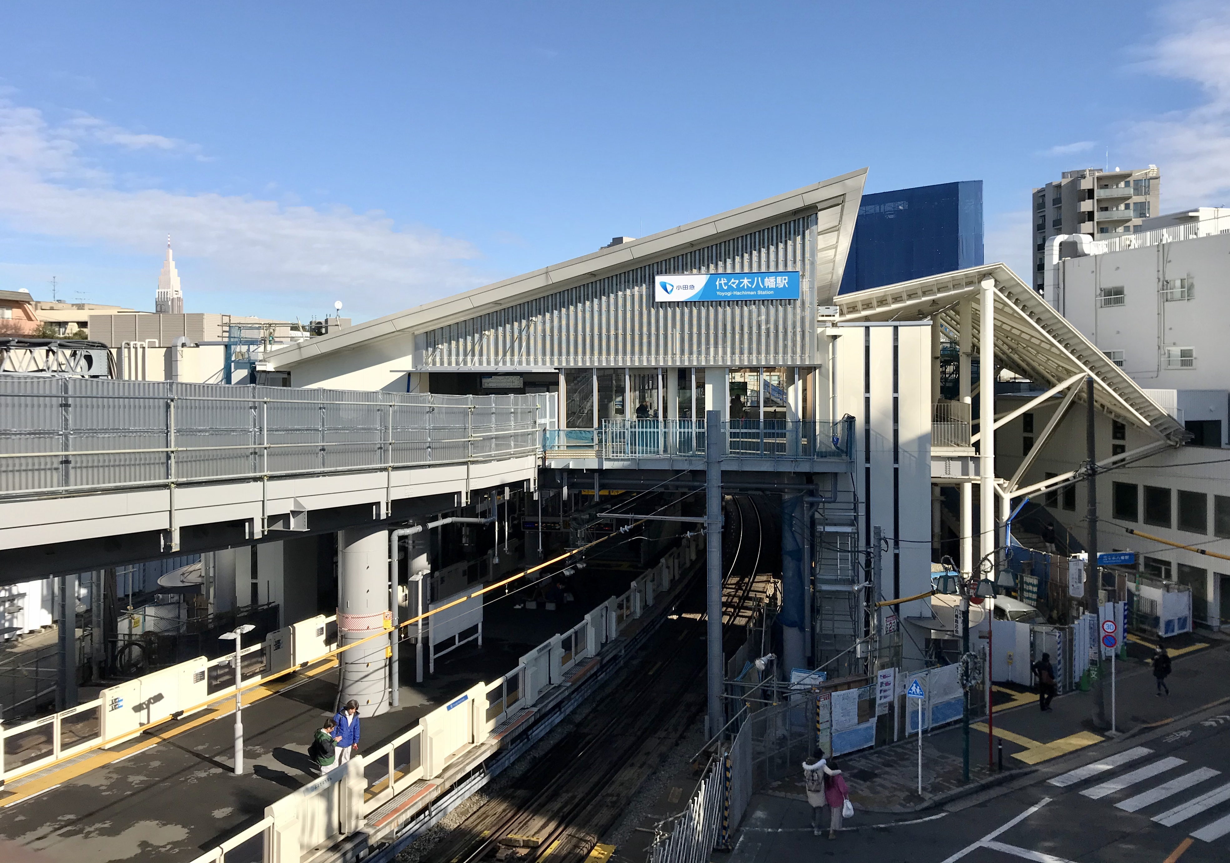 小田急電鉄小田原線代々木八幡駅西口